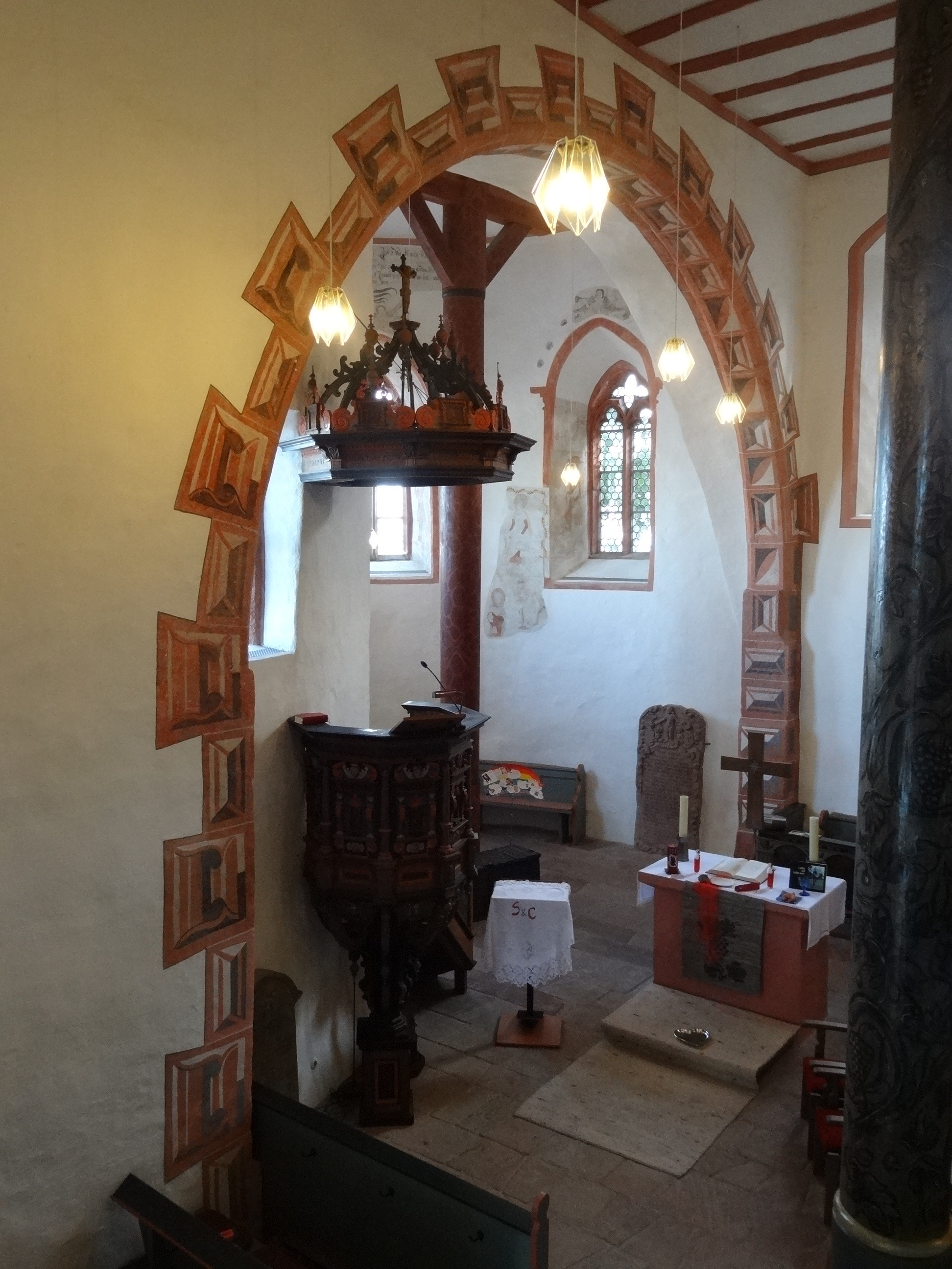 Evangelische Katharinenkirche Gleiberg